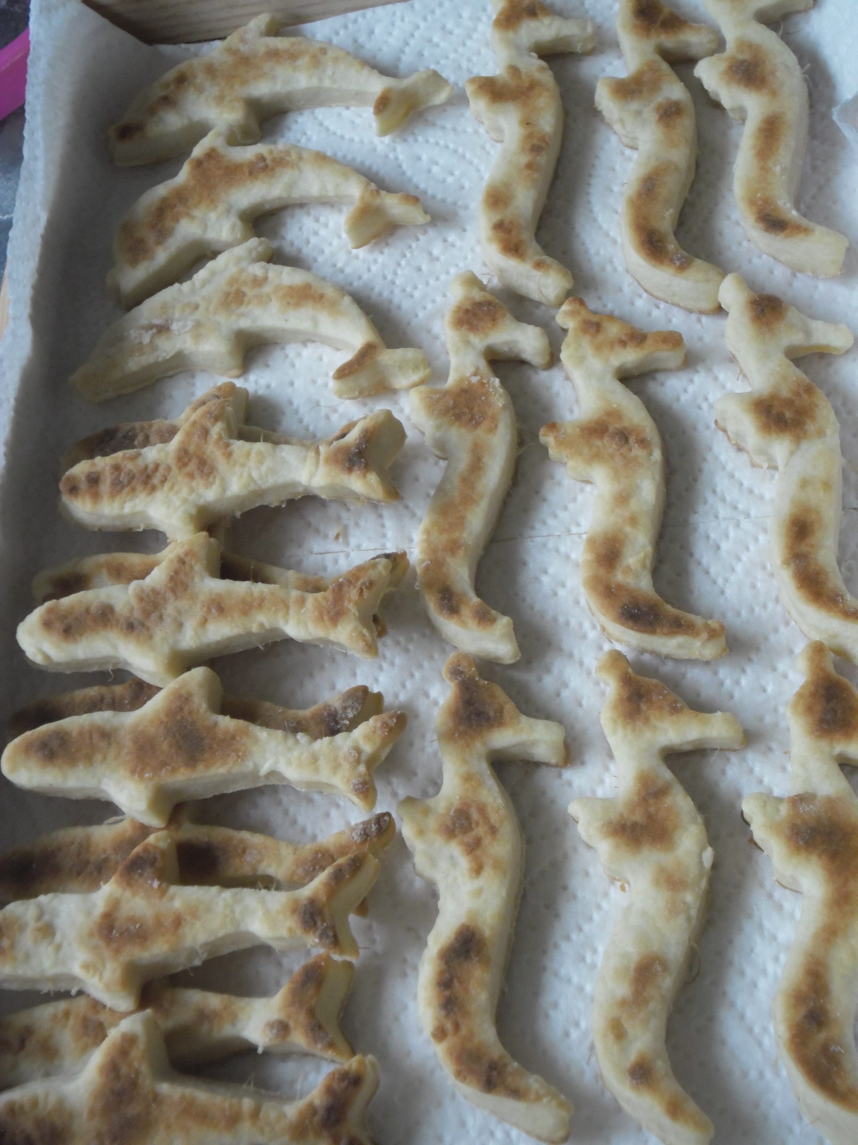 Sablés cuits en forme de poissons